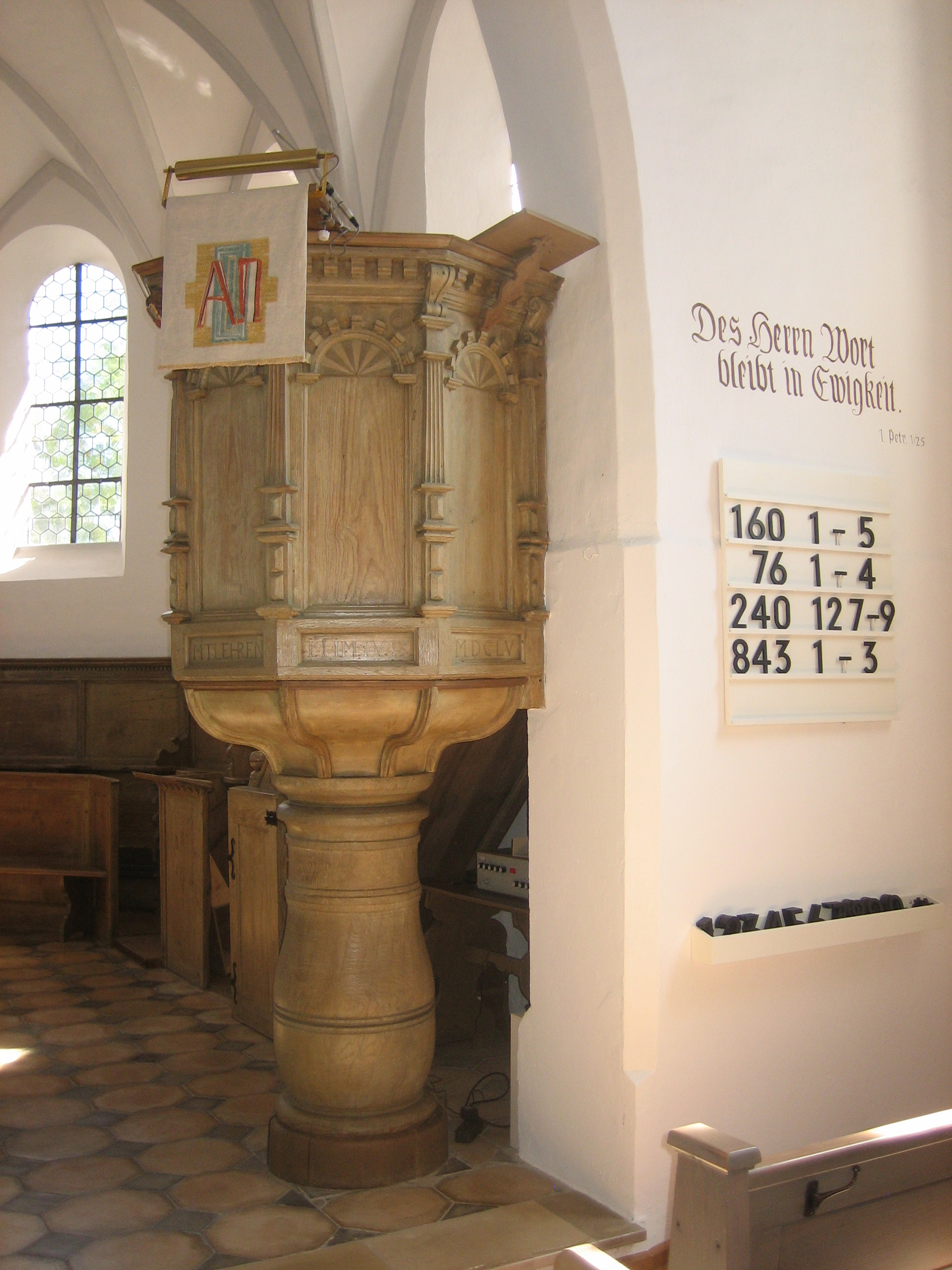 Pfarrkirche Herbishofen, Lachen, Landkreis Unterallgäu, Bayern